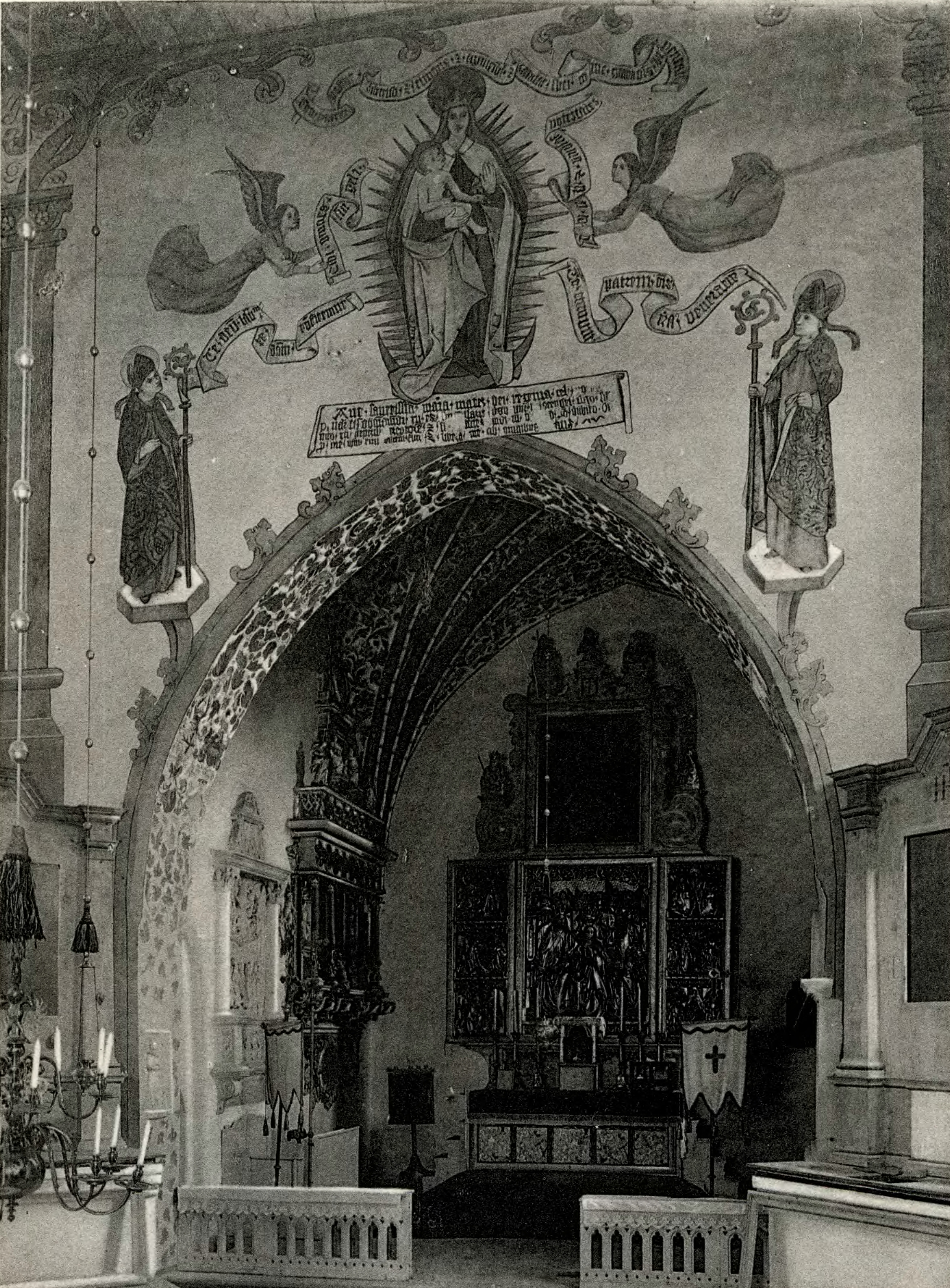 Innenansicht der katholischen Kirche in Tschirnau, Kreis Guhrau. Ca. 1912. Blick auf die Ostwand mit Chor.